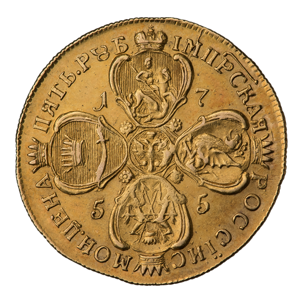 Пять рублей 1755 г. (реверс). ГМ 226.XII.10; Биткин 82 (R2). Четыре украшенных щита с гербами царств Российской империи расположены в виде креста. В центре изображение двуглавого орла, увенчанного тремя императорскими коронами, со скипетром и державой в лапах. Вверху герб Москвы; внизу — царства Сибирского; справа — царства Казанского; слева — царства Астраханского. Вокруг орла четыре розы. Цифры даты 1755 на поле между щитами. Круговая надпись: IМПРСКАЯ РОССЇИС МОН. ЦЕНА ПЯТЬ. РUБ